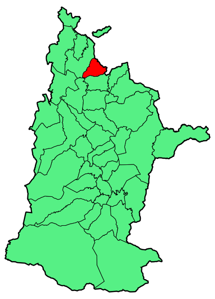 Aipaturiko udalerriaren kokapena Zuberoan